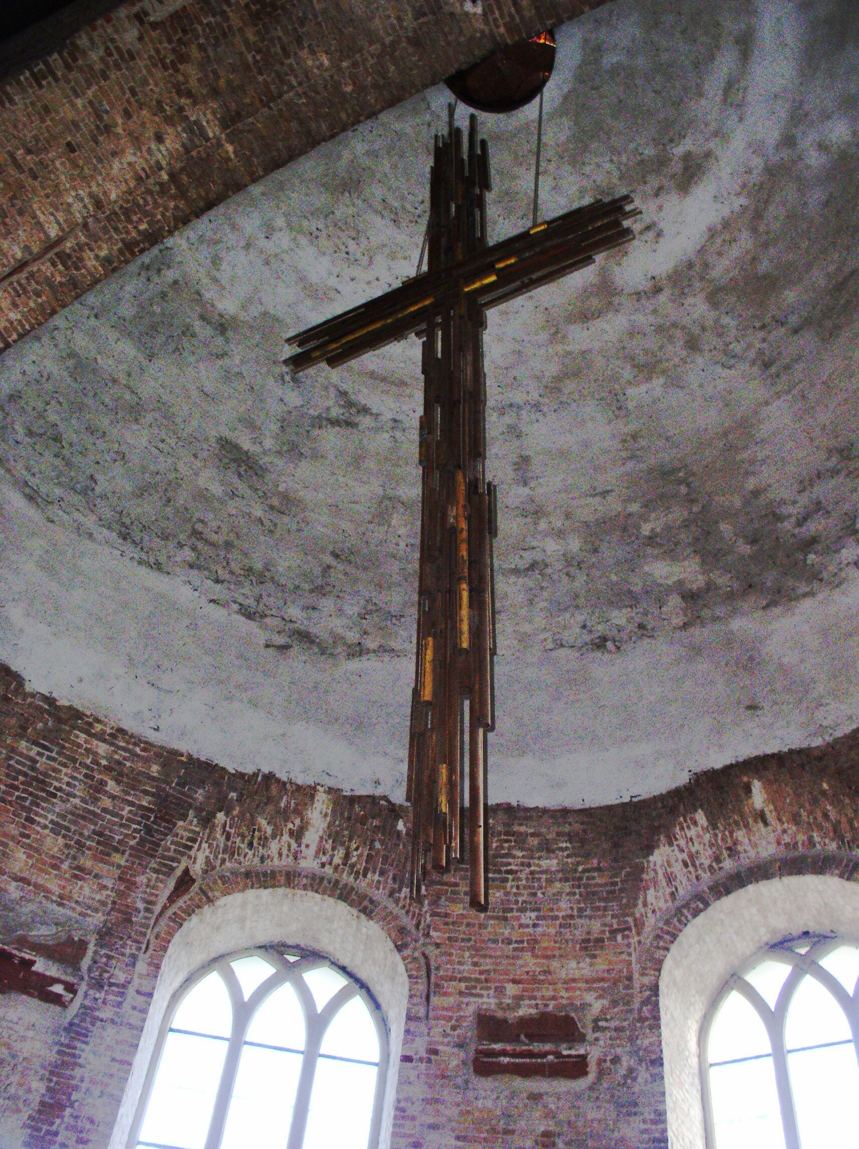 Parochialkirche Berlin-Mitte, Innenraum